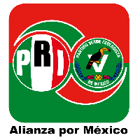 Alianza por México (2006)